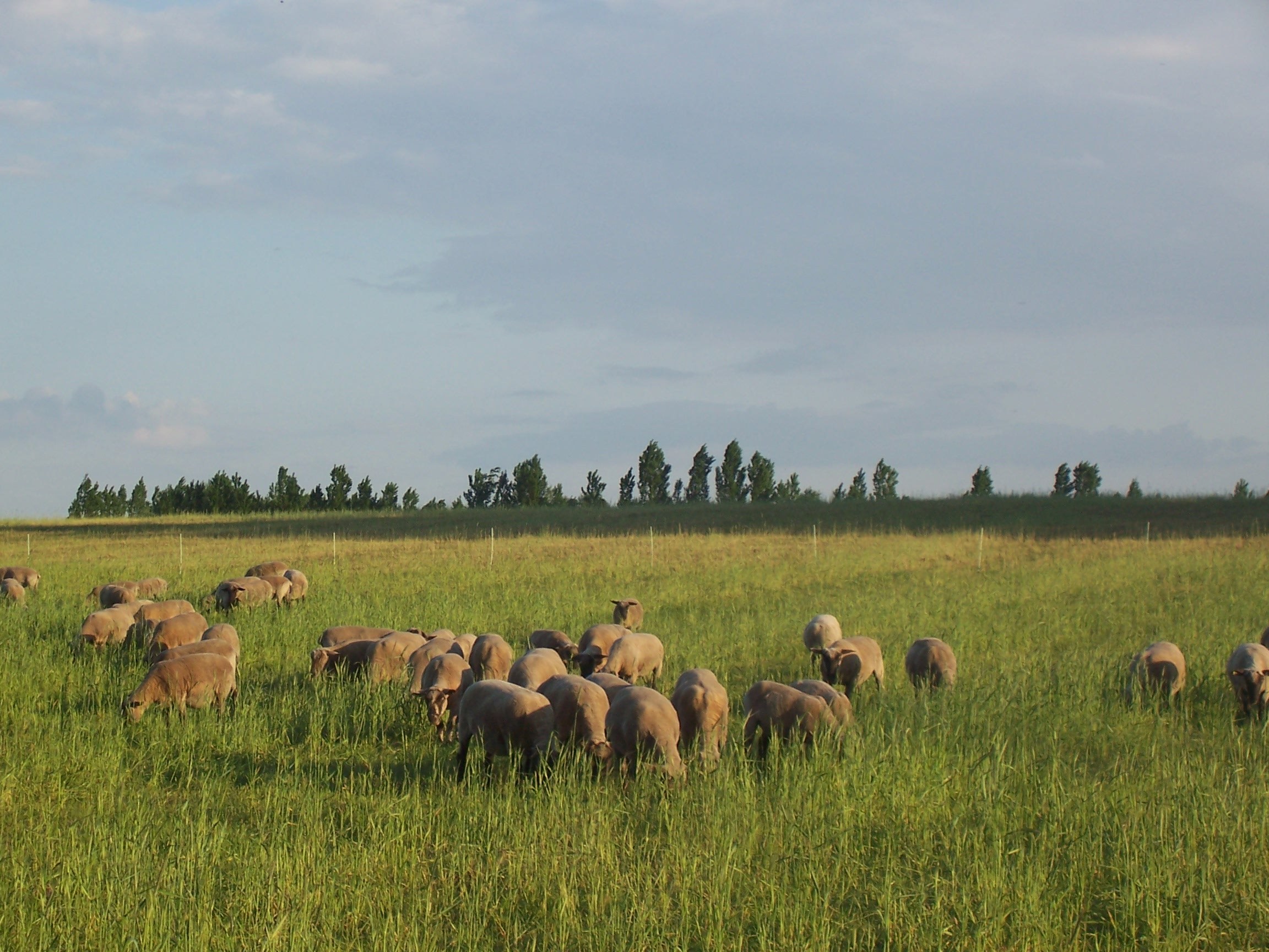 Langerwisch Süden, Deutschland